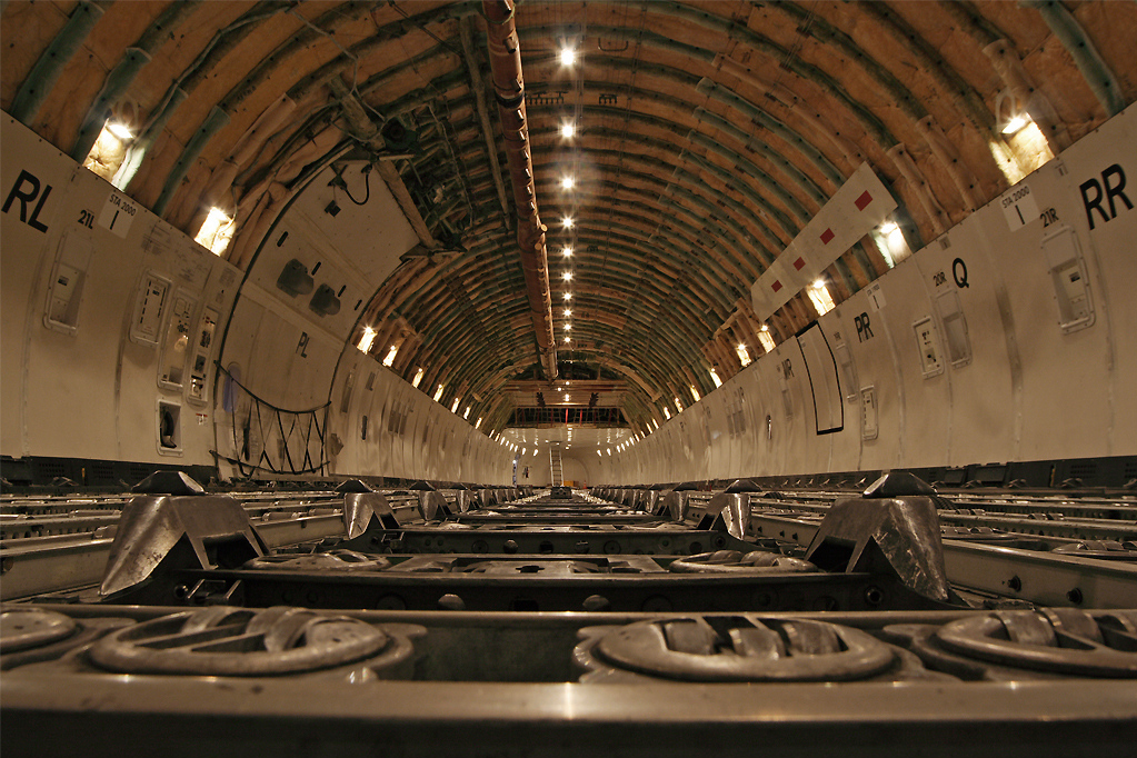 Een vrachtvliegtuig is een vliegtuig dat goederen vervoert. Het heeft een grote laadruimte op het "maindeck" maar daarnaast meestal ook nog ruimte voor vracht in het "lowerdeck".